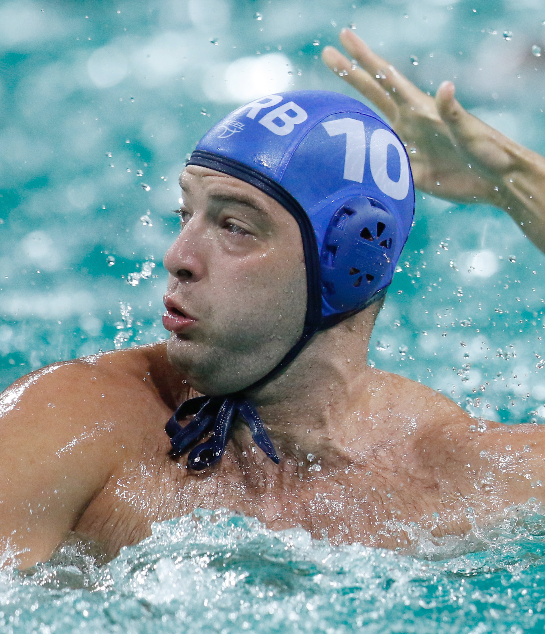 Rio de Janeiro - Seleção masculina brasileira de polo aquático vence a da Sérvia por 6 a 5 nos Jogos Olímpicos Rio 2016, no Parque Aquático Maria Lenk (Fernando Frazão/Agência Brasil)